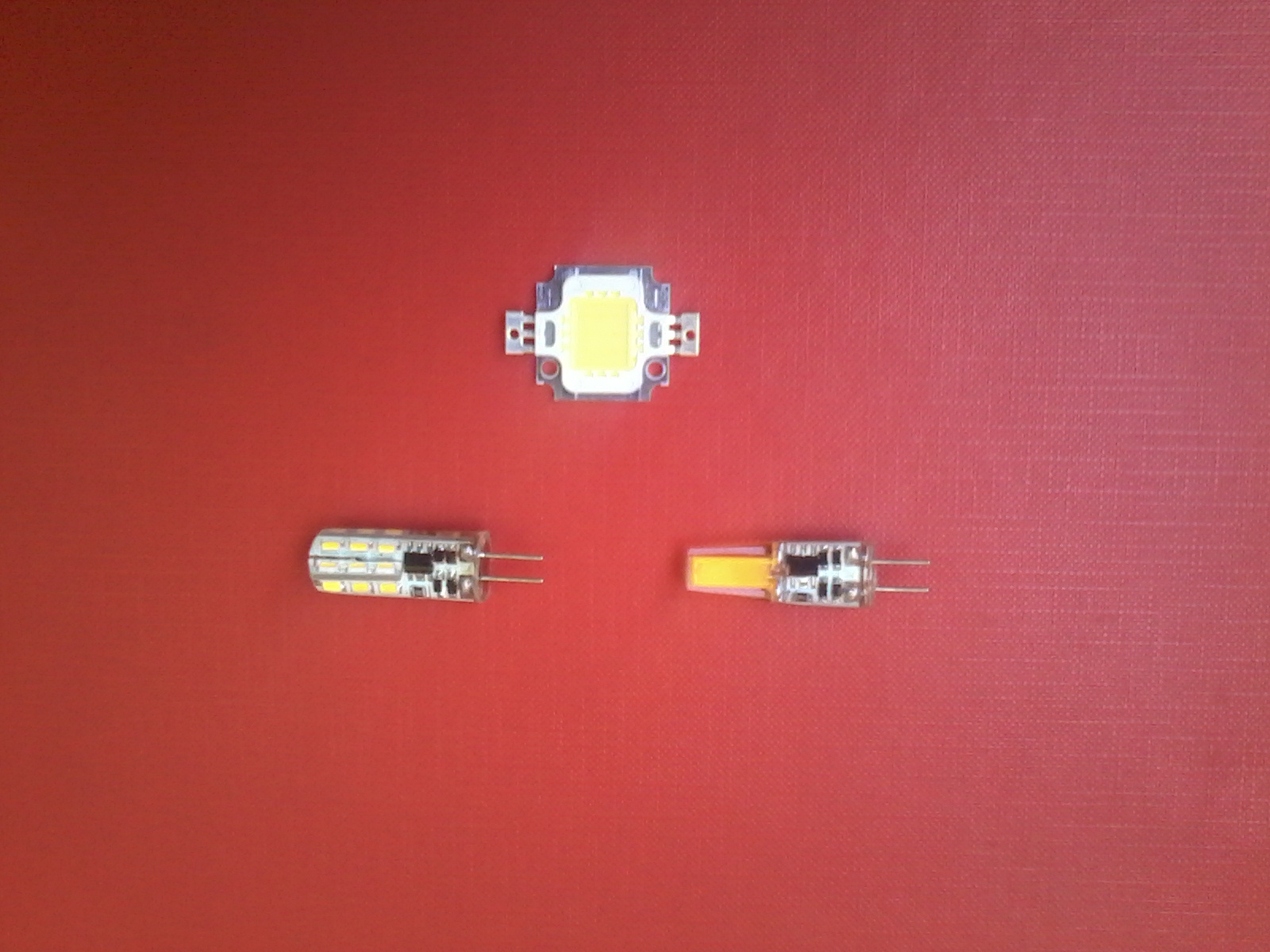 Знято мобілкою Самсунг